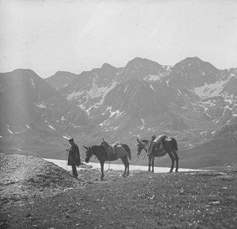 Un home i dues mules al port d'Envalira. Frederic Bordas i Altarriba (1882)